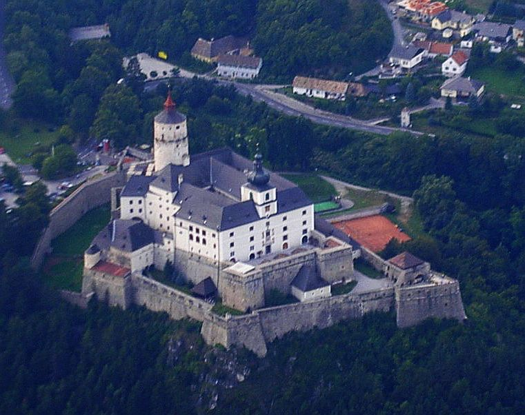 Burg Forchtenstein aus der Luft fotografiert